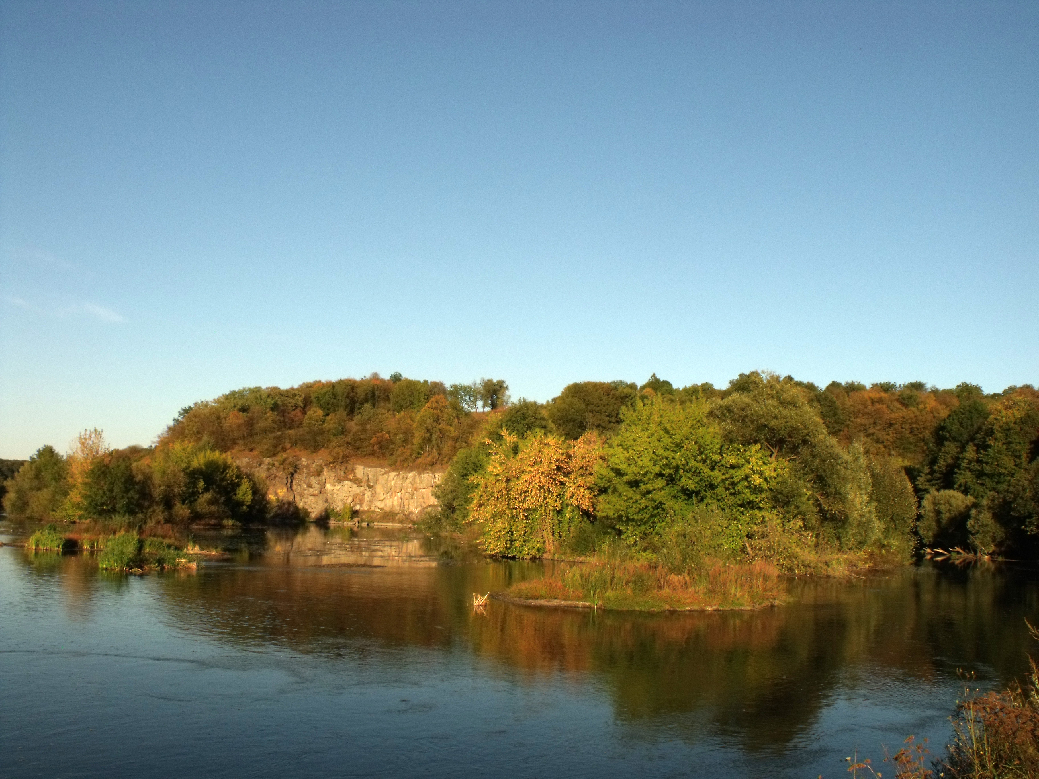 Вінницька область, Тиврівський район, с. Шершні